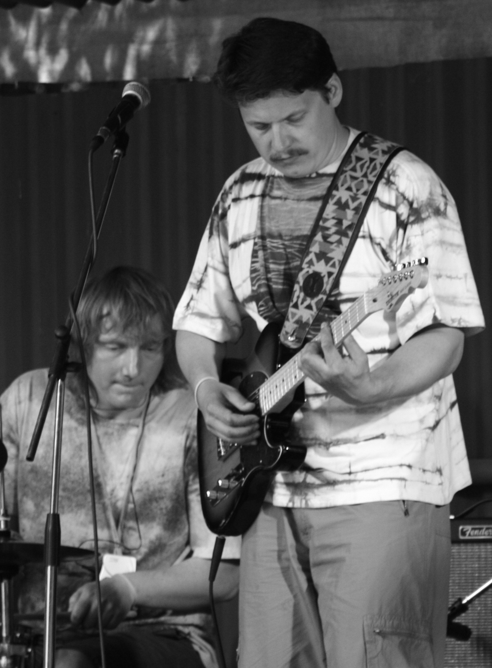 Val u Dobrušky 2006